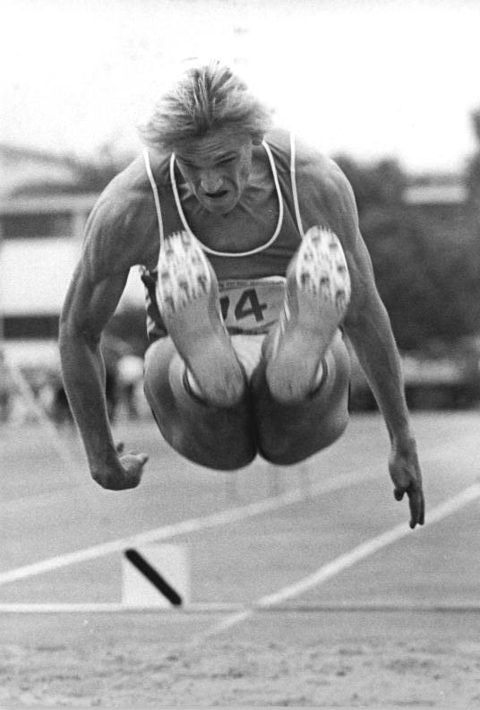 Jens Hirschberg ADN-ZB Settnik 25.8.87 Berlin: Leichtathletik-Sportfest. Beim nationalen Leichtathletik-Sportfest zur Verabschiedung der Weltmeisterschafts-Mannschaft der DDR im Sportforum gewsann der 23jährige Magdeburger Jens Hirschberg den Weitsprung-Wettbewerb mit 8,30 Metern (bei 2,6 m-s Rückenwind; regulär 7,94 m) .